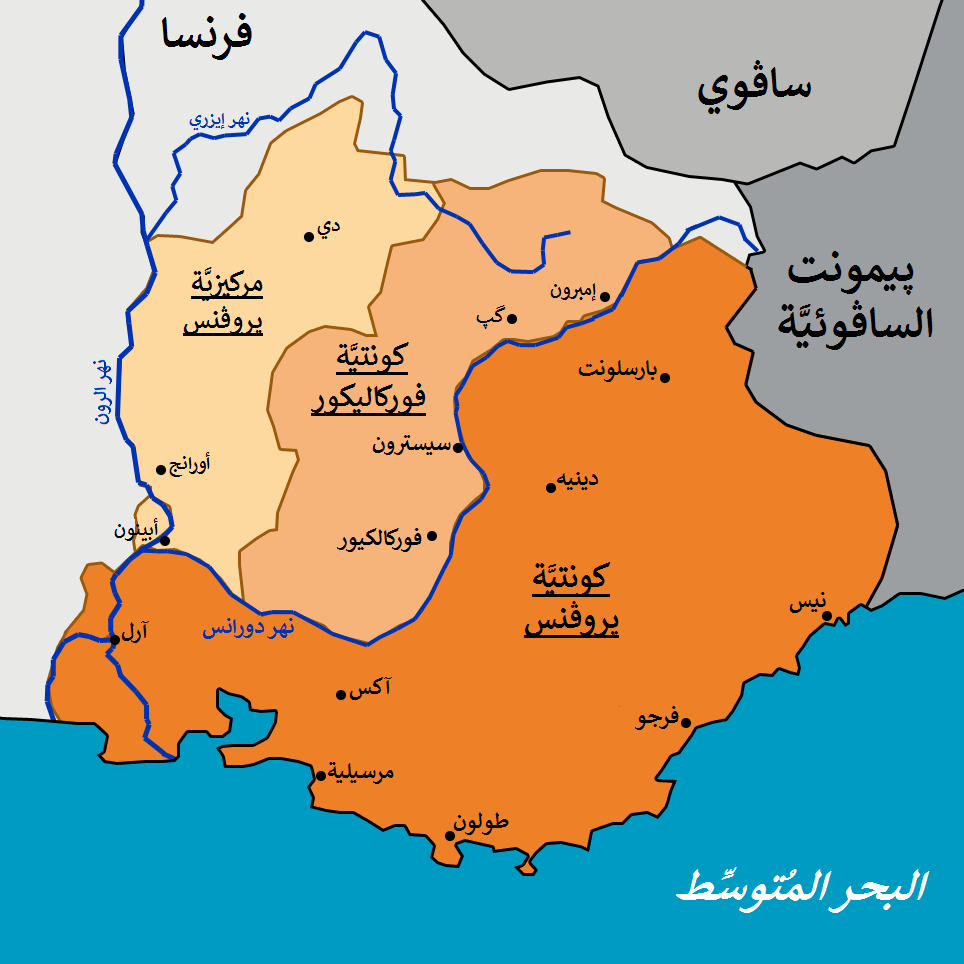 خريطة مُقاطعة پروڤنس سنة 1125م.